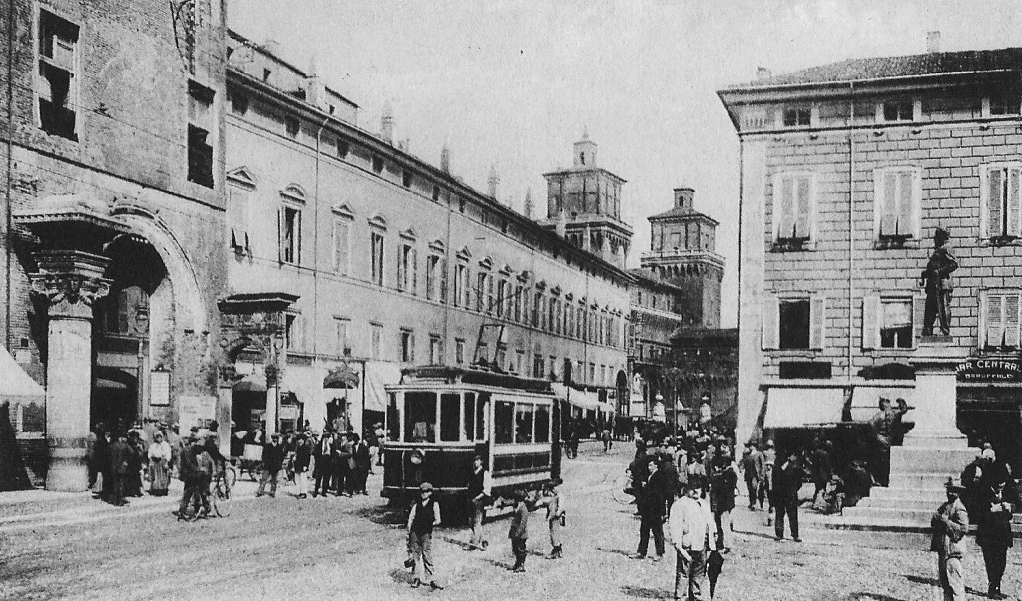 Ferrara: sulla sinistra il Palazzo Municipale prima dei rifacimenti della fine degli anni Venti del '900 con il Volto del Cavallo senza le statue di Borso d'Este e Niccolò III d'Este. Sul sagrato della Cattedrale di San Giorgio era visibile il monumento al Re Vittorio Emanuele II di Savoia realizzato nel 1889 dallo scultore Giulio Monteverde. La statua è ora in deposito presso il Museo del Risorgimento di Ferrara. Cartolina postale, inizio 1900, collezione privata